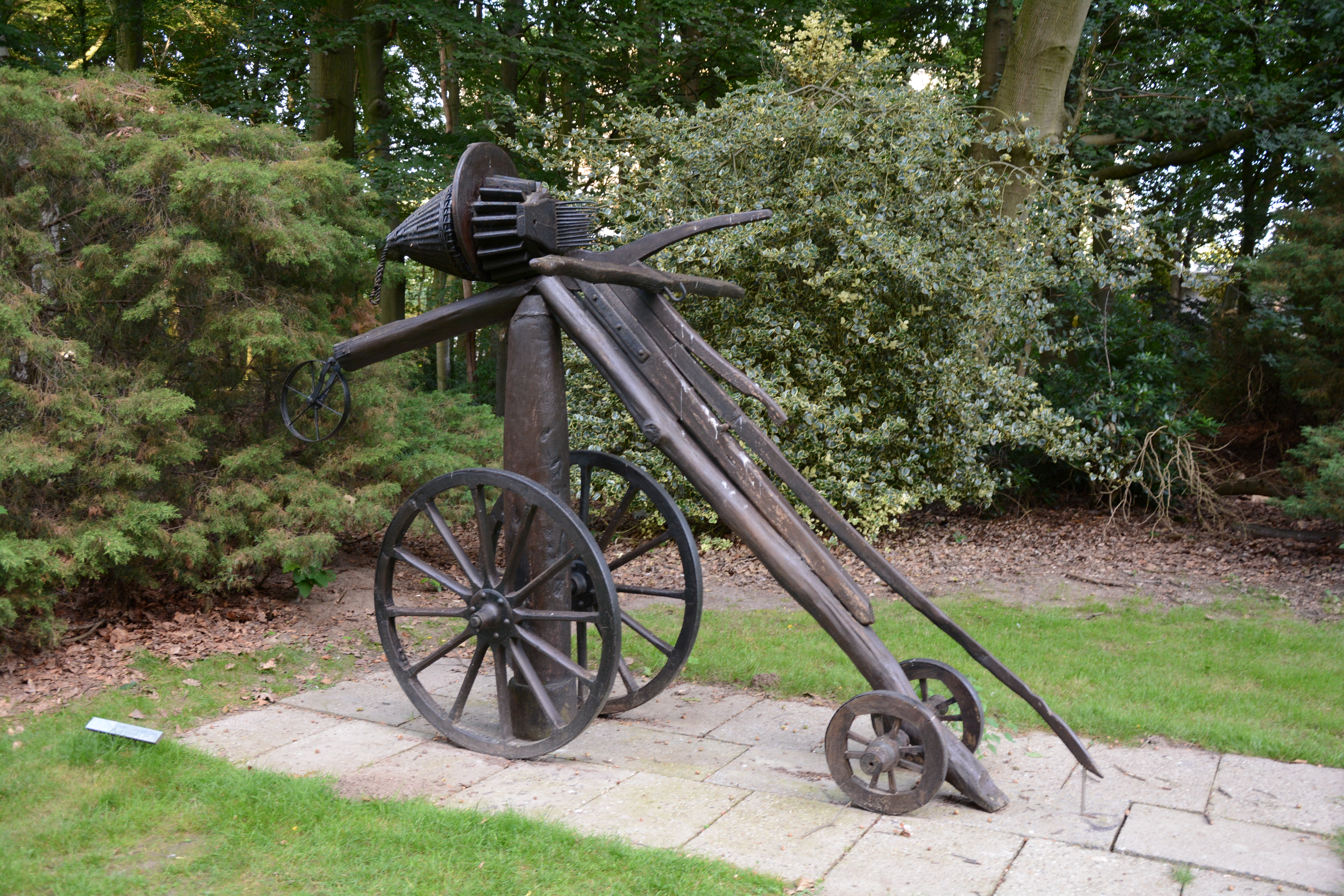 Camiel Van Breedam, Zonnewagen, 1974 in Middelheim Museum